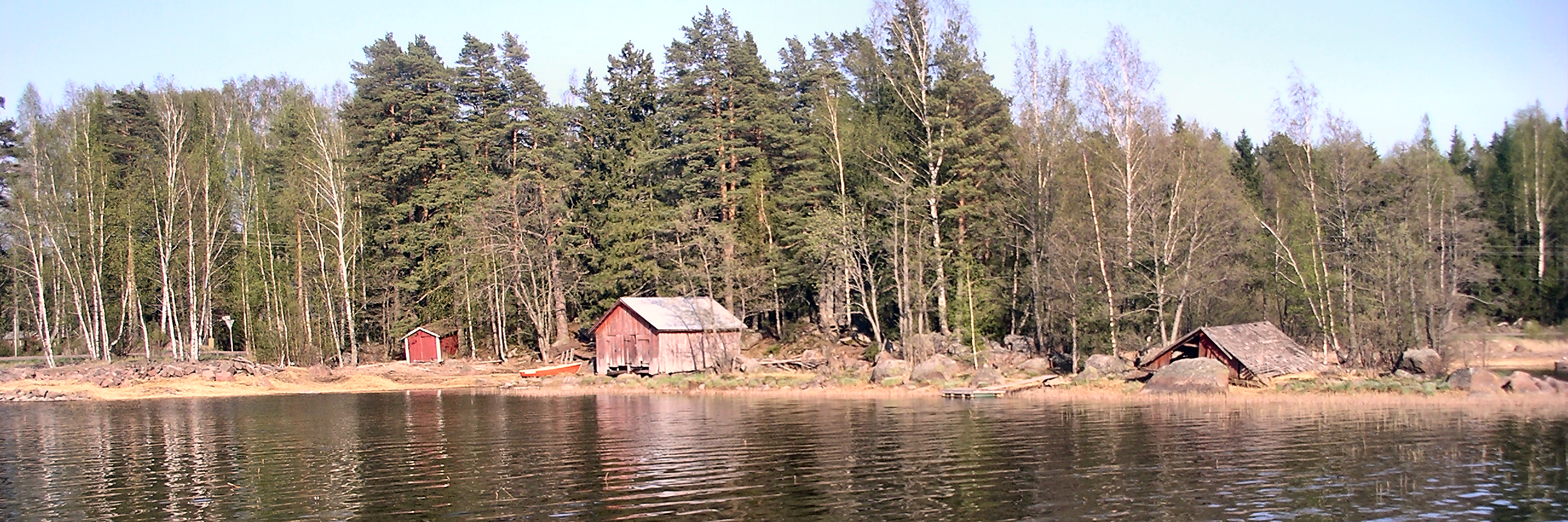 Båthus i Svartbäck Pyttis (Pyhtää)